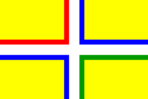 Urdulizko bandera, Bizkaian